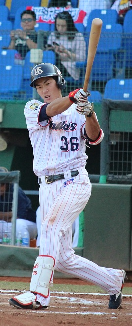 台湾での一枚